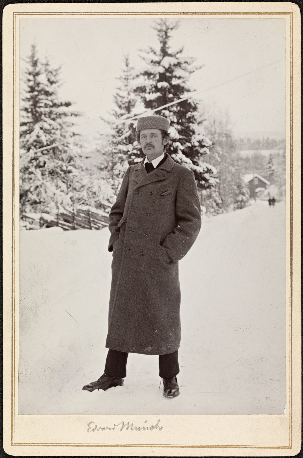 Tittel / Title: Portrett av Edvard Munch (1863-1944) Motiv / Motif: Kabinettkort. Fotografiet stammer fra Gyldendals historiske portrettarkiv. Dato / Date: ukjent / unknown Fotograf / Photographer: ukjent / unknown Eier / Owner Institution: Nasjonalbiblioteket / National Library of Norway Lenke / Link: Bildesignatur / Image Number: blds_04878